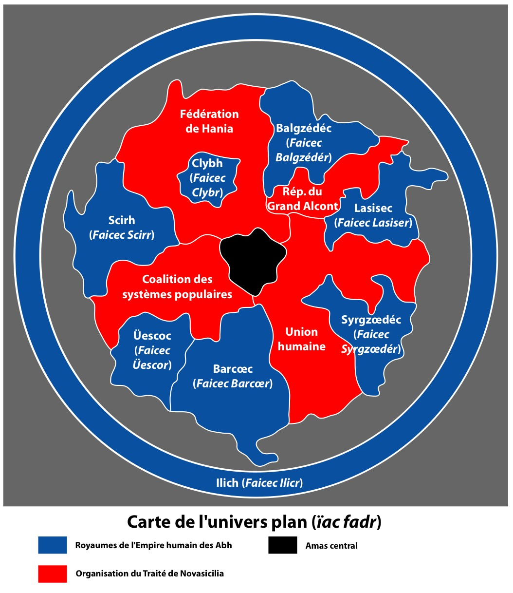 Dessiné par moi-même d'après les images de l'adaptation animée de Banner of the Stars